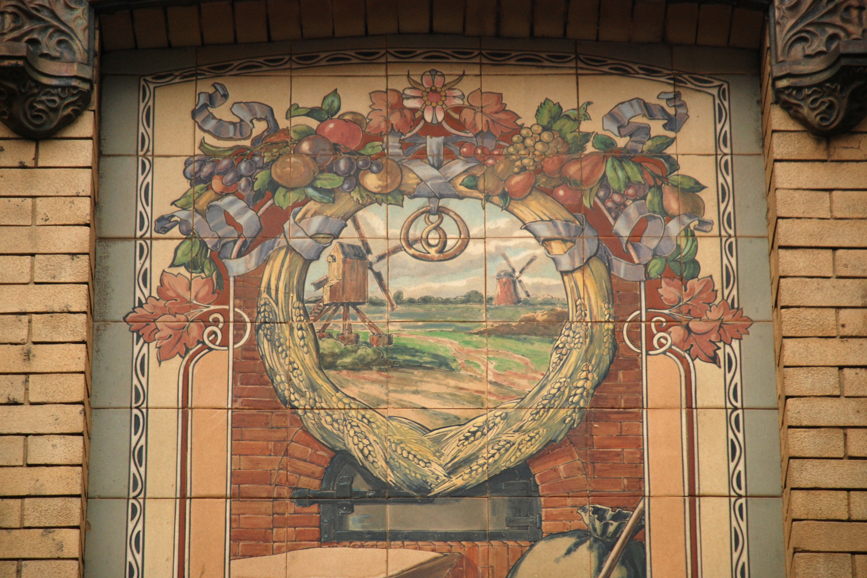 Belgique - Bruxelles - Berchem-Sainte-Agathe - Chaussée de Gand 1224 - Art nouveau - Célestin Joseph Helman